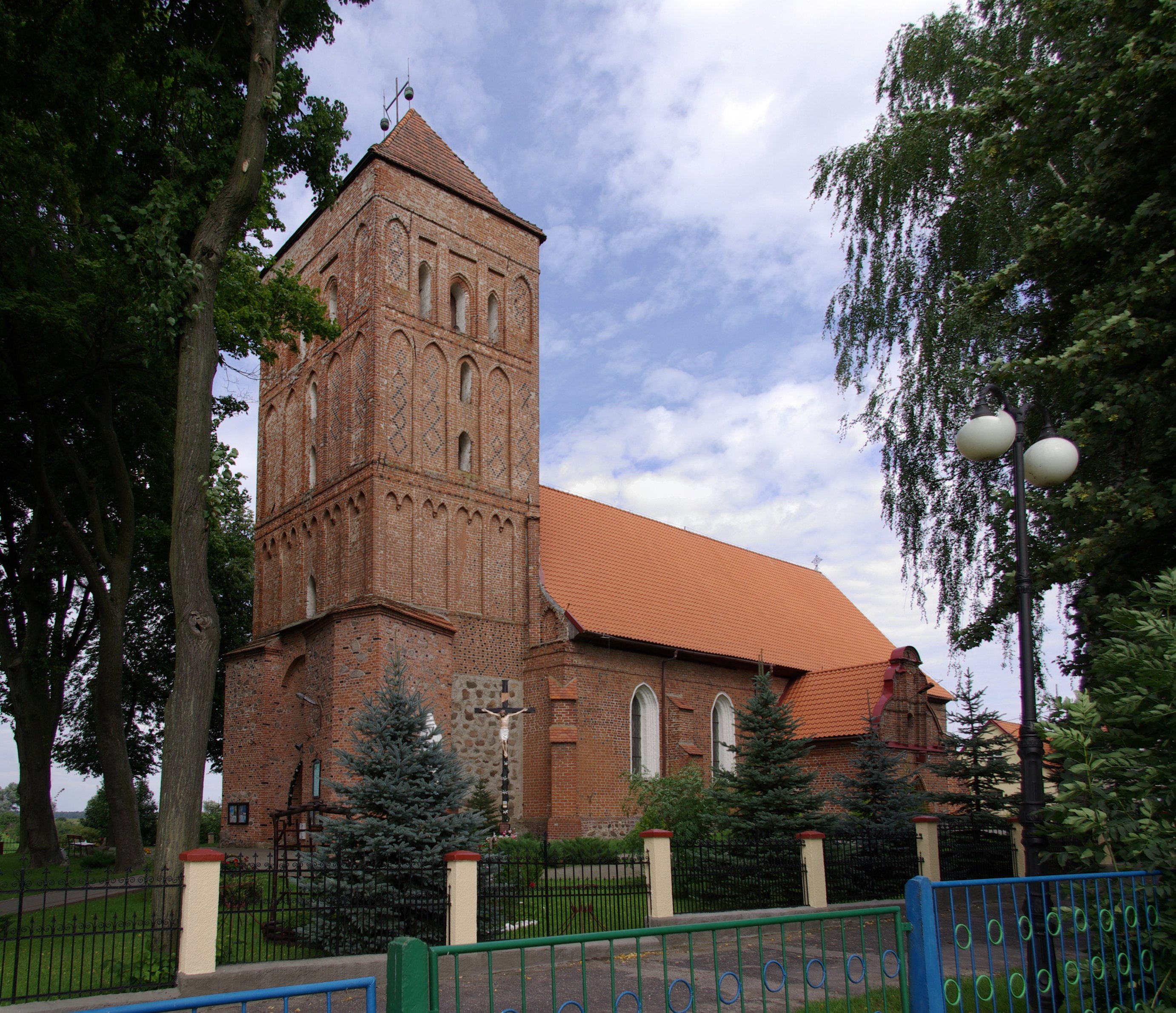 Srokowo